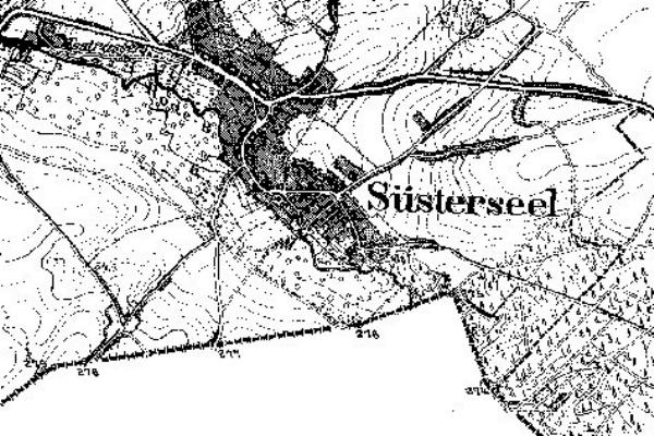 Neuaufnahme 1891 -1912